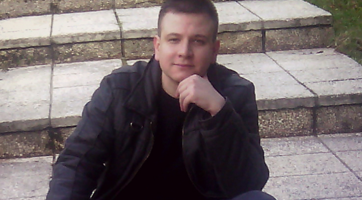 Srpski (latinica): Ivan Kalauzović Ivanus na Jahorini